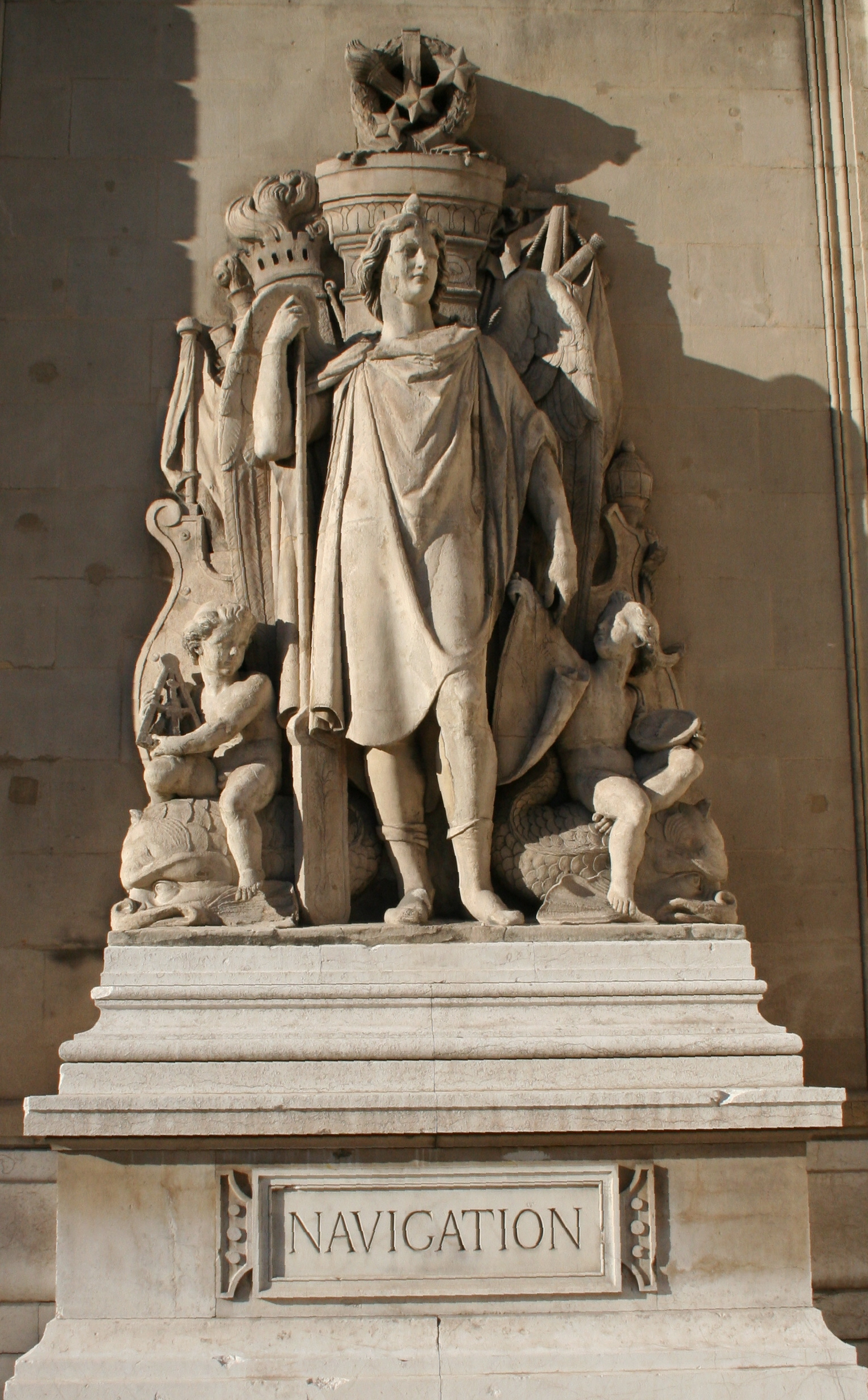 Palais de la bourse à Marseille, façade, statue représentant la navigation sculptée par Eugène Guillaume.